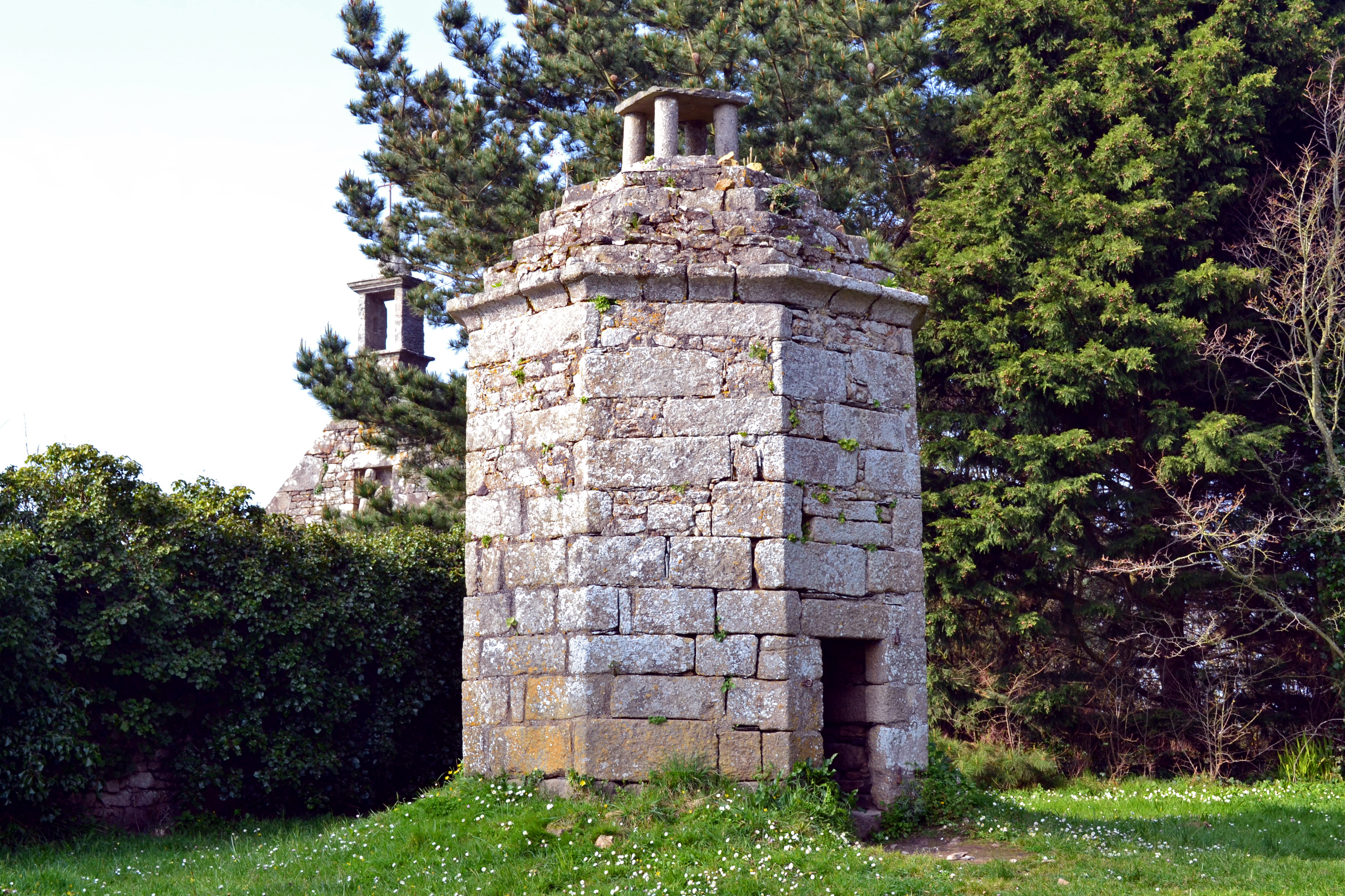 Colombier de Kerigou (du nom d'un ancien manoir) près de la chapelle Saint-Charles-Borromée à Saint-Pol-de-Léon.